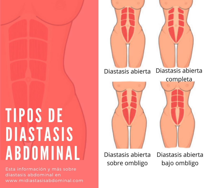 Tipos de diastasis abdominal